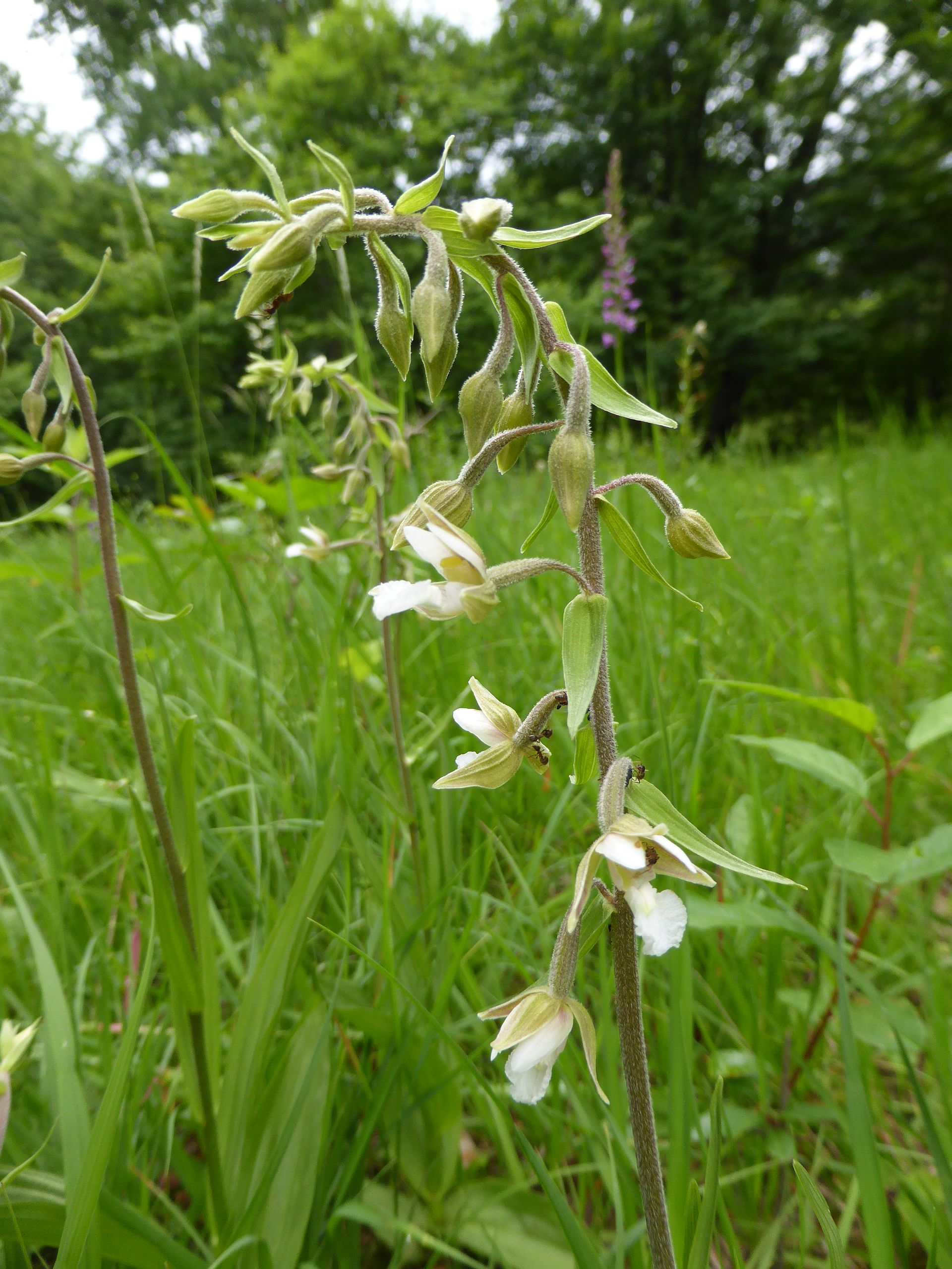 Sumpf-Stendelwurz (Epipactis palustris), Dietlingen, NSG Essigberg, 19.06.2015